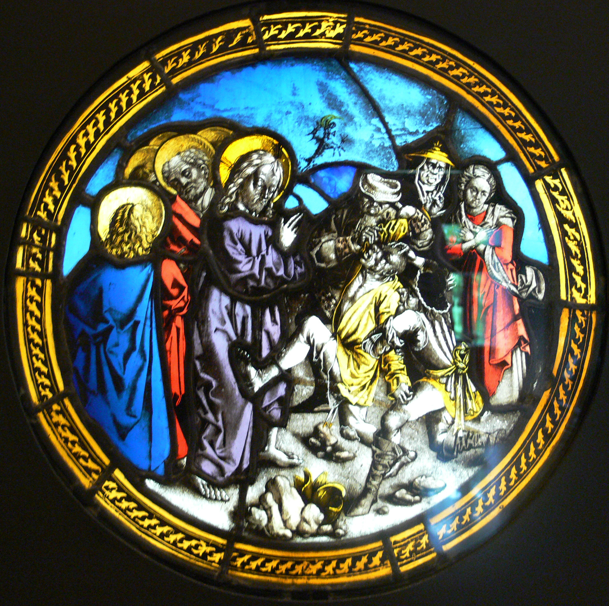 Heilung des stummen Besessenen (Lukas 11,14–16) Rundscheibe aus der Gräflich Erbach'schen Sammlung auf Schloss Erbach im Odenwald; ursprünglich wohl für das Rathaus in Ulm geschaffen; Straßburg (Peter Hemmel?), um 1480 Kunstgewerbemuseum Berlin, Inv. Nr. Æ 563